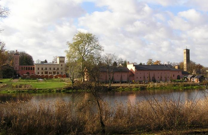 Das Krongut Bornstedt am Park Sanssouci)